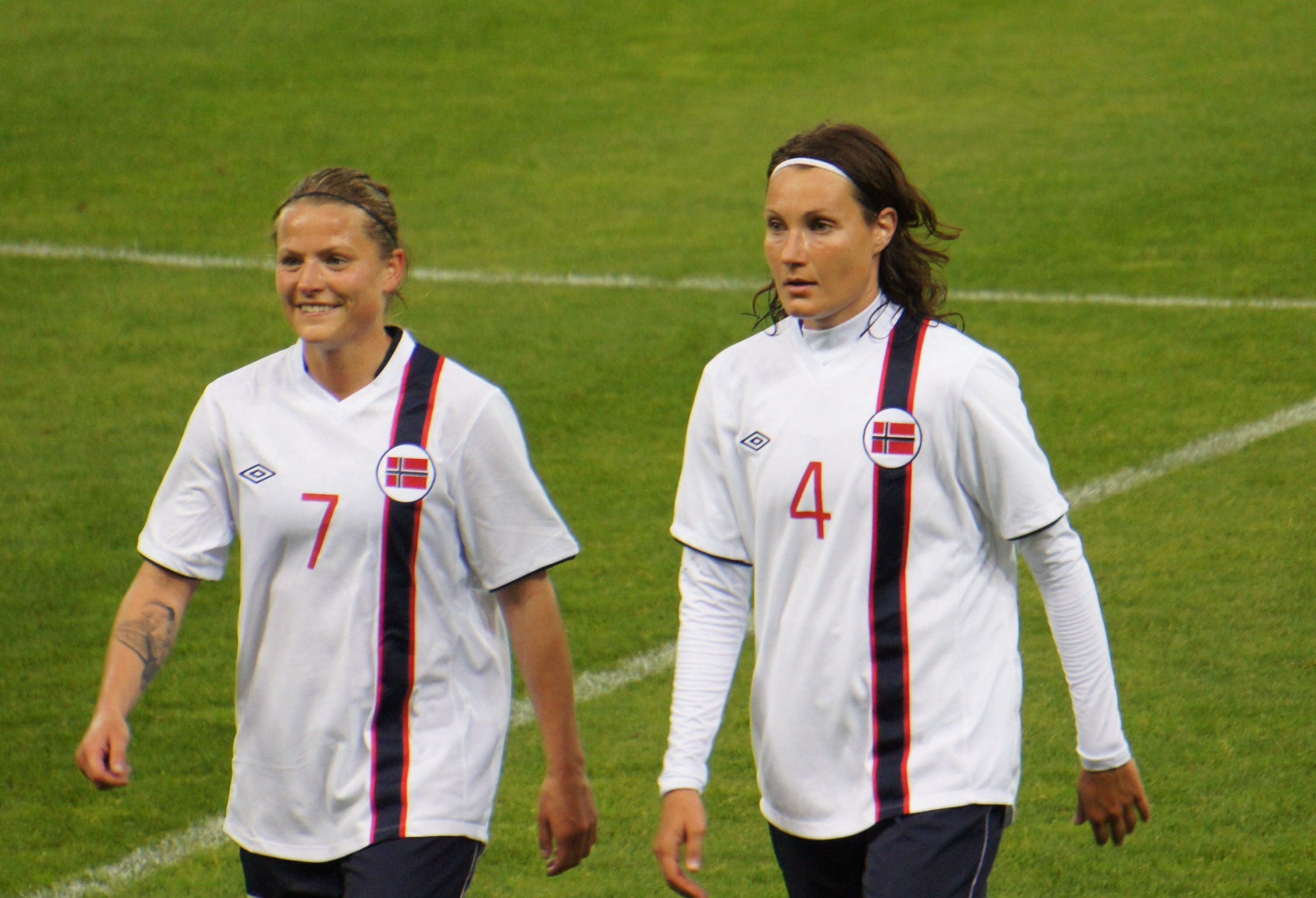 En équipe de Norvège.